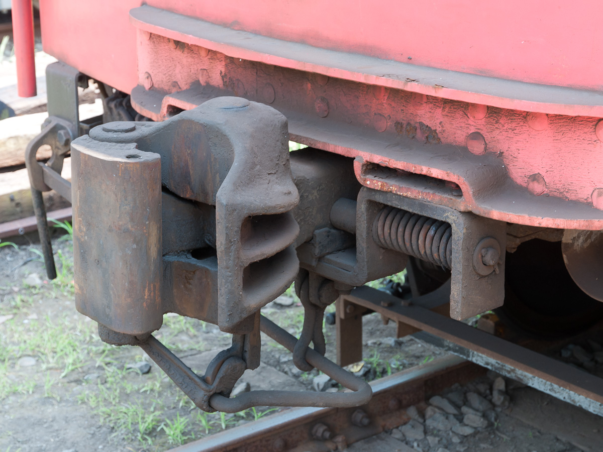 シャロン式自動連結器、下作用型。